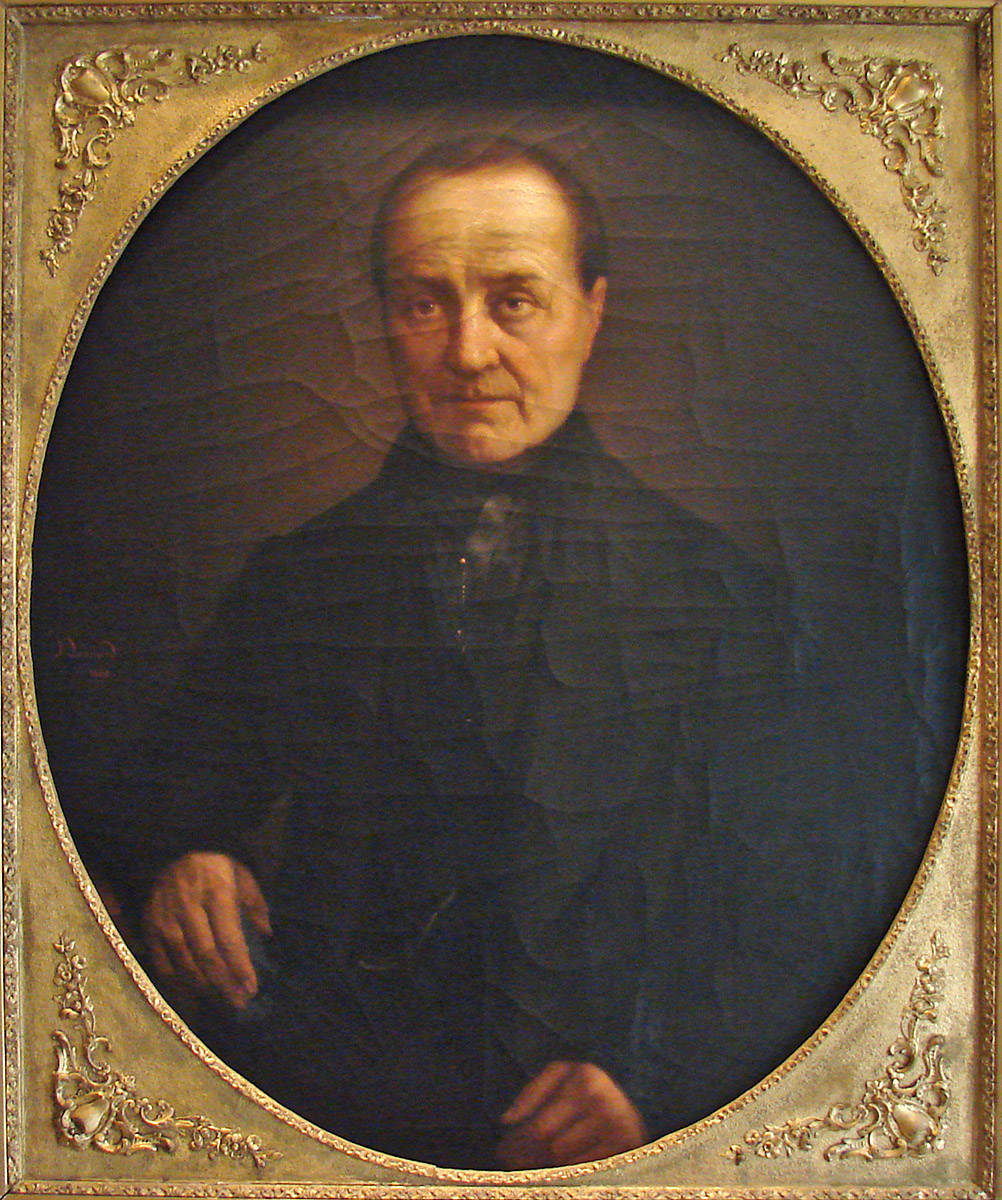 Auguste Comte, grand esprit de son temps, le fondateur du positivisme, a construit une des plus grandes philosophies systématiques du XIXè siècle. Sa philosophie positive se compose : - d'une philosophie des sciences qui réordonne toute l'encyclopédie et y ajoute la sociologie, - d'une philosophie politique et sociale qui veut réorganiser la société en France, en Occident et dans le monde.